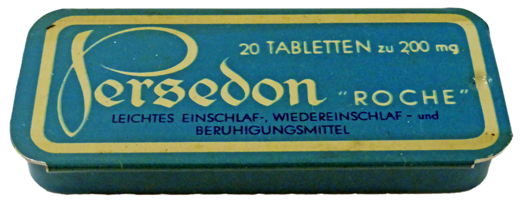 Historische Blechdose von Persedon.